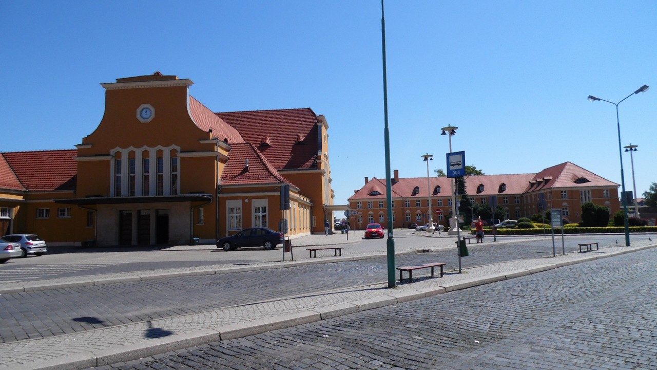 Plac Dworcowy.